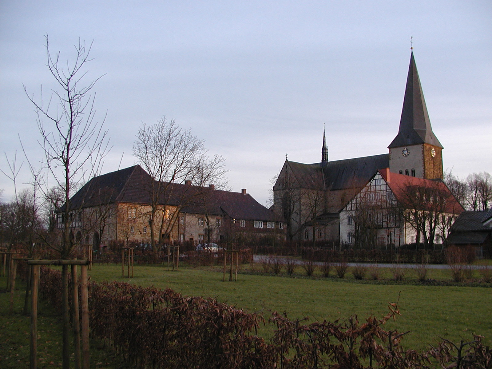 Bild der Pfarrkirche St. Christina in Herzebrock